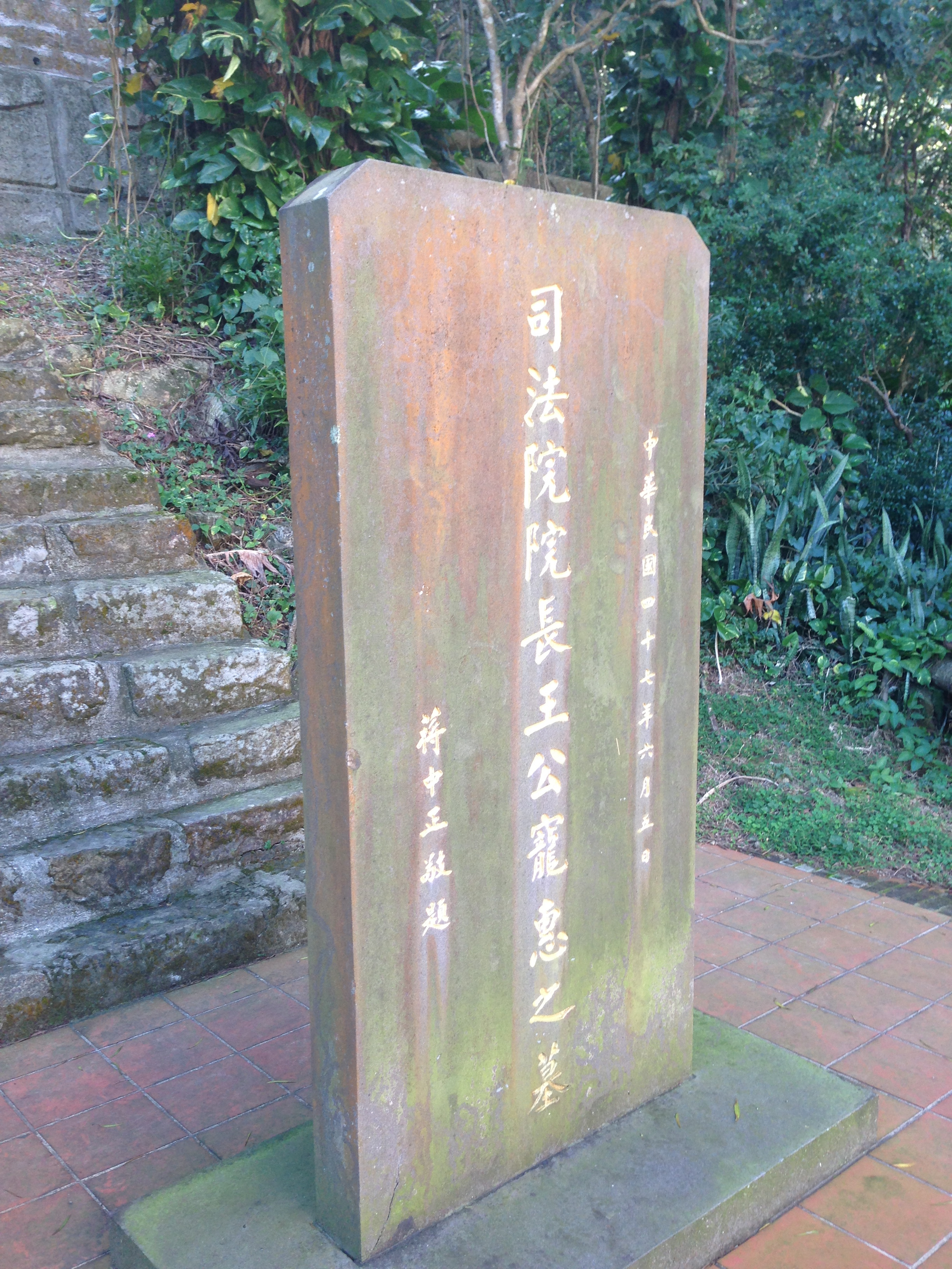 中文（台灣）: 王寵惠墓碑，1958年（中華民國47年）6月5日蔣中正題字。